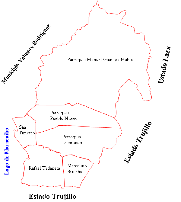 Mapa de las parroquias del Municipio Baralt, Estado Zulia, Venezuela